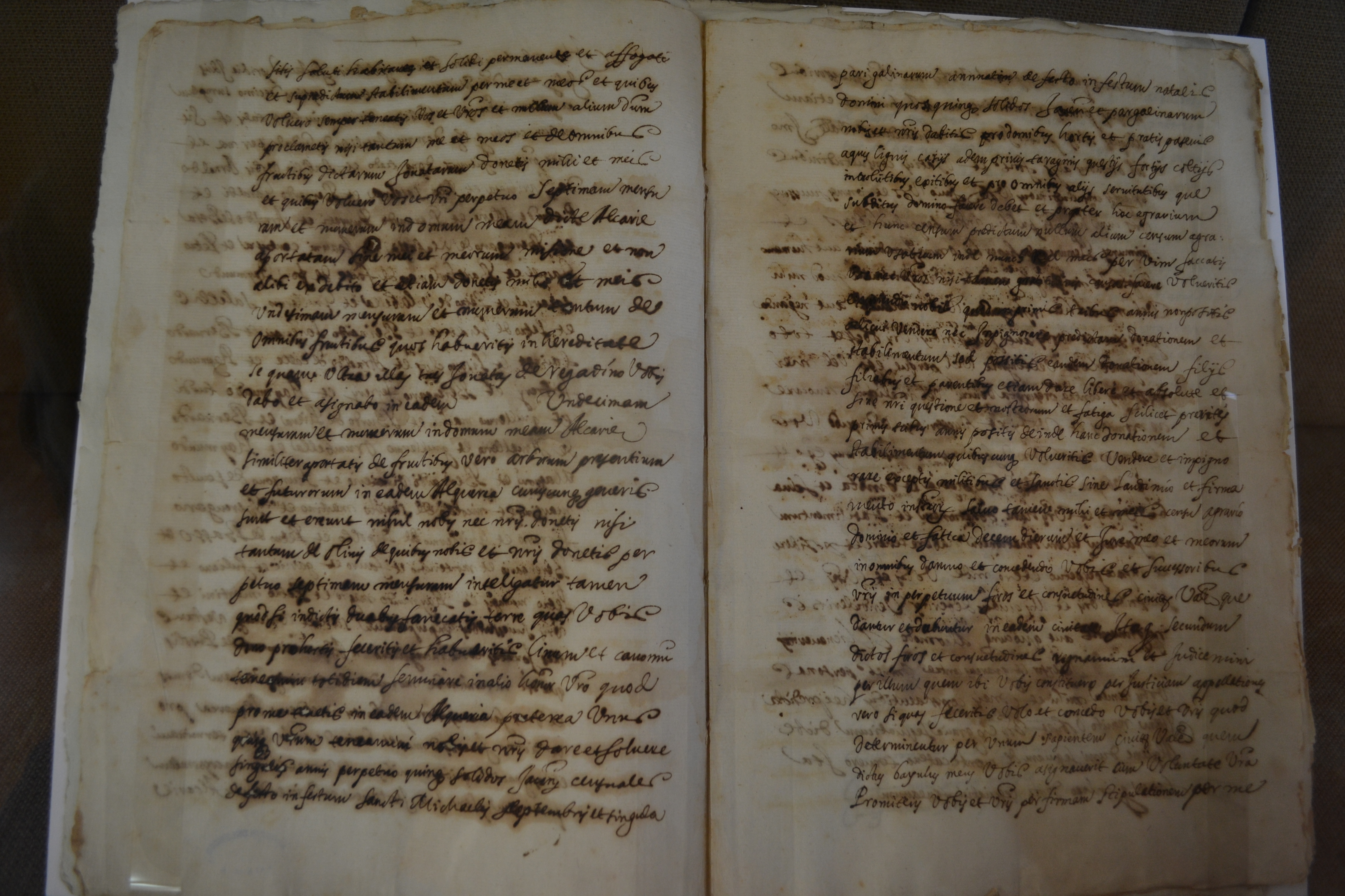 Assalit de Gùdal, senyor de Puçol, concedeix carta pobla a dita alqueria, en el terme de Morvedre, per a 39 pobladors, els quals són enumerats, donant-los l'us del fur de València. 28 d'agost de 1242. Còpia pridie idus julio de 1317. ARV: Fons del Seminaria de "Nobles Educandos" de València, caixa 2, doc. 1. Arxiu del Regne de València